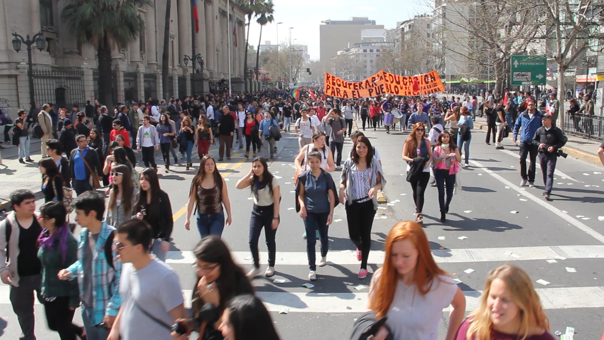 Marcha el 6 de septiembre de 2013 en Santiago